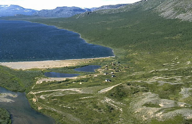 Laponia Motiv: Bietsávrre (Pietsaure) Nyckelord: Flygbilder, Riksintressen, Världsarv Kategori: Sameviste Laponia.